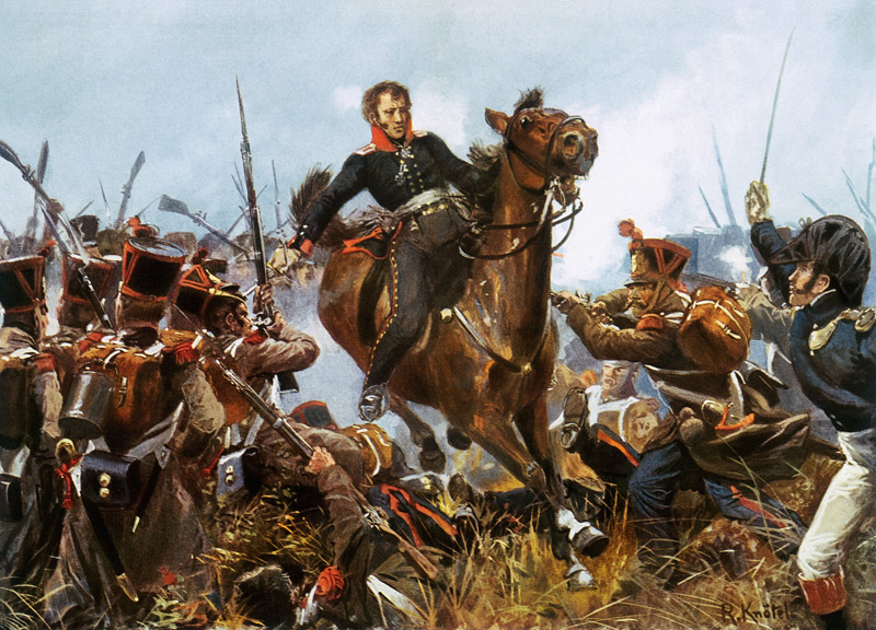 Major Heinrich von Krosigk fällt am 16. Oktober 1813 bei den Gefechten um Möckern in der Völkerschlacht bei Leipzig